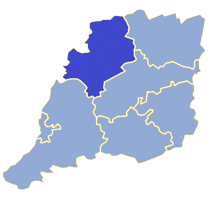 Powiat krośnieński (województwo lubuskie) - Gmina Maszewo